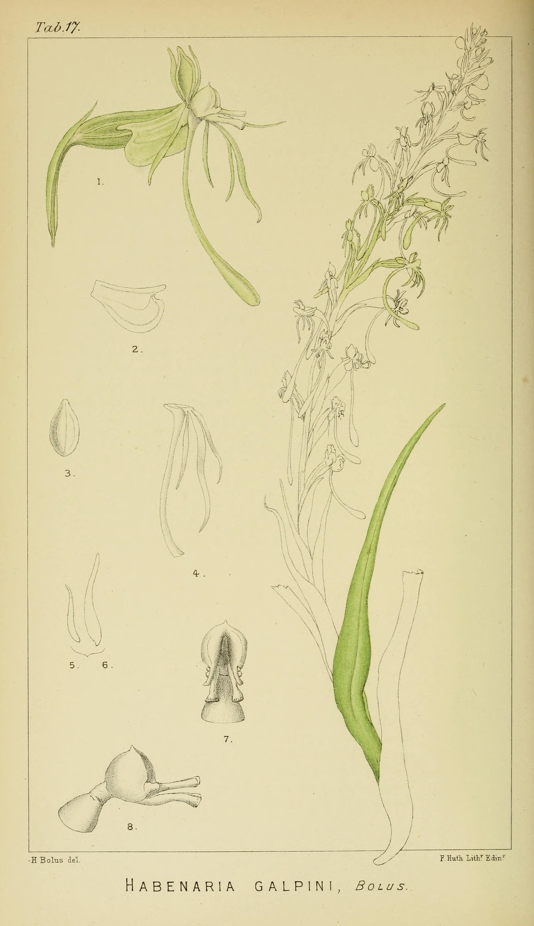 Tccb.17- ■H Bolus del. HaBENARIA GALPIN Bolus.